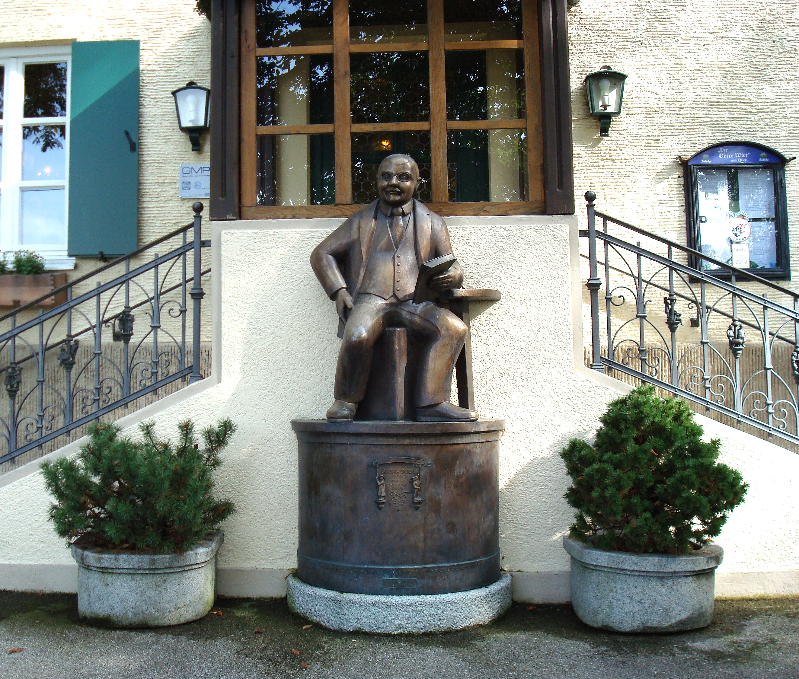 Andechs, OT Frieding, Georg-Queri-Ring 9. Denkmal des bayerischen Schriftstellers Georg Queri (1879-1919) vor seinem Geburtshaus in Frieding.